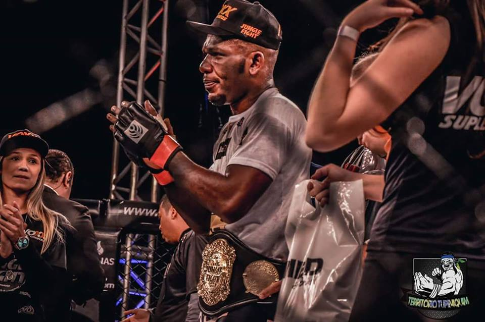 Campeão